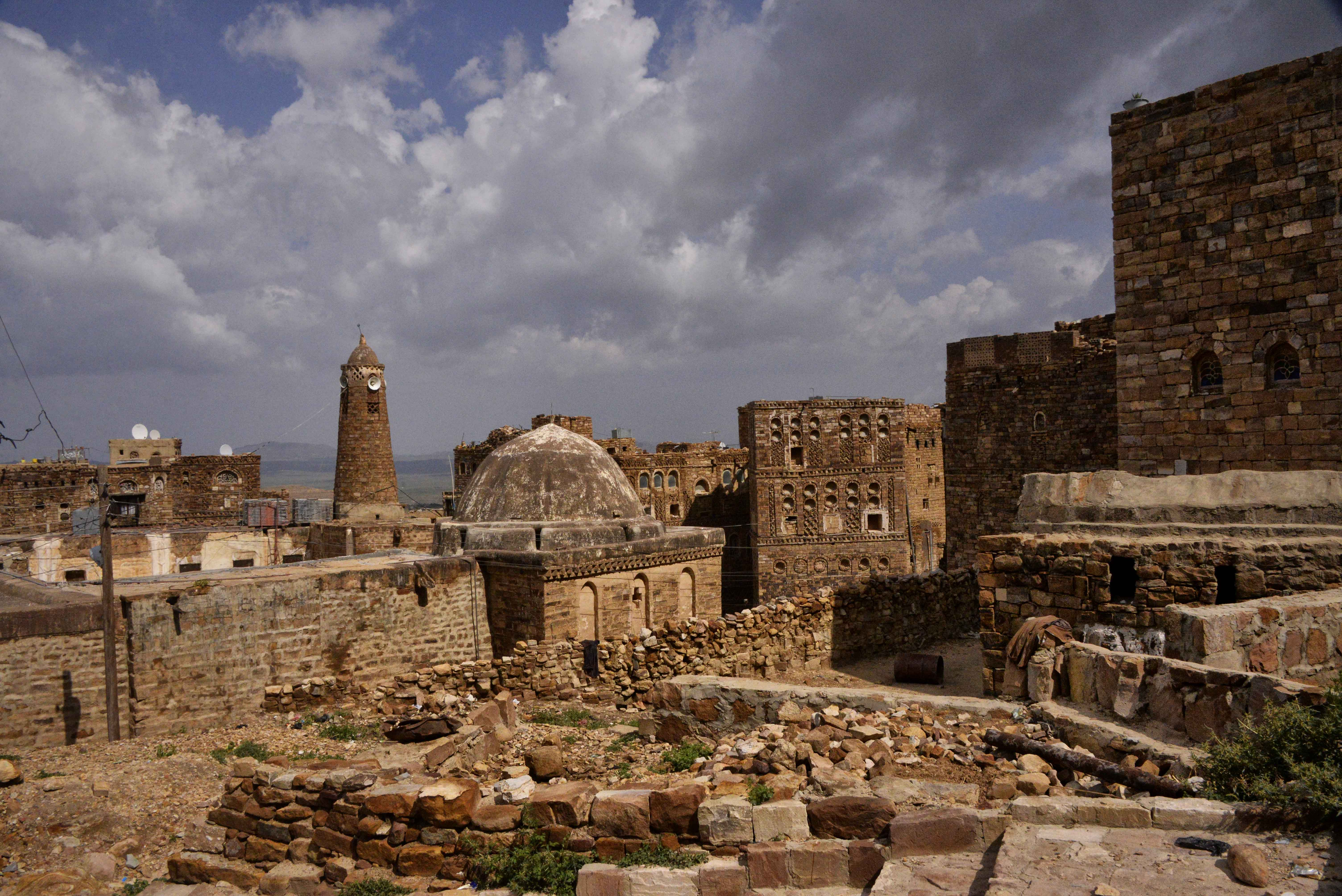 Yemen